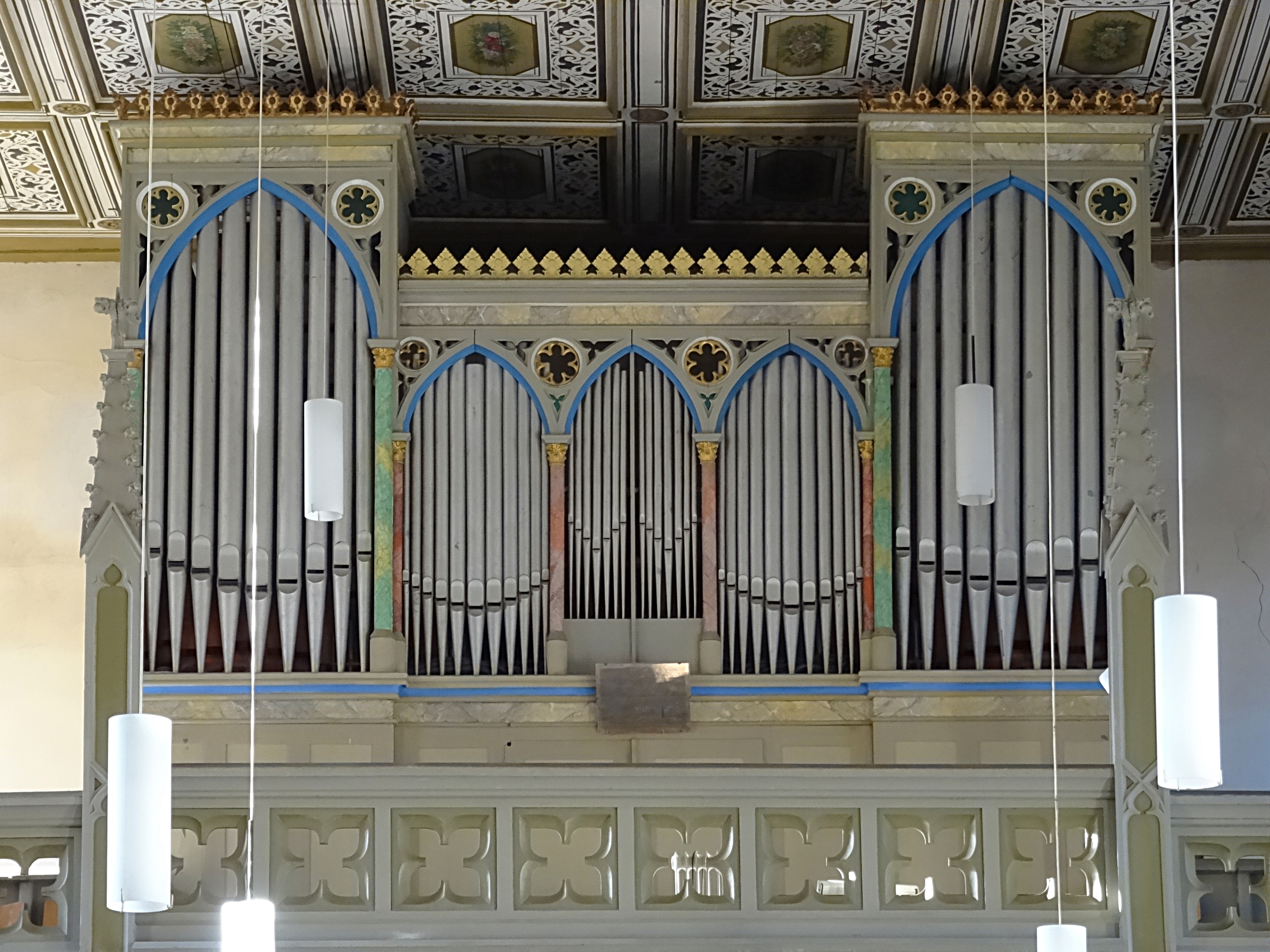 Orgel in der St.Annen-Kirche (Eisleben) von Christian Friedrich Voigt (1852, IIP/22)[1]